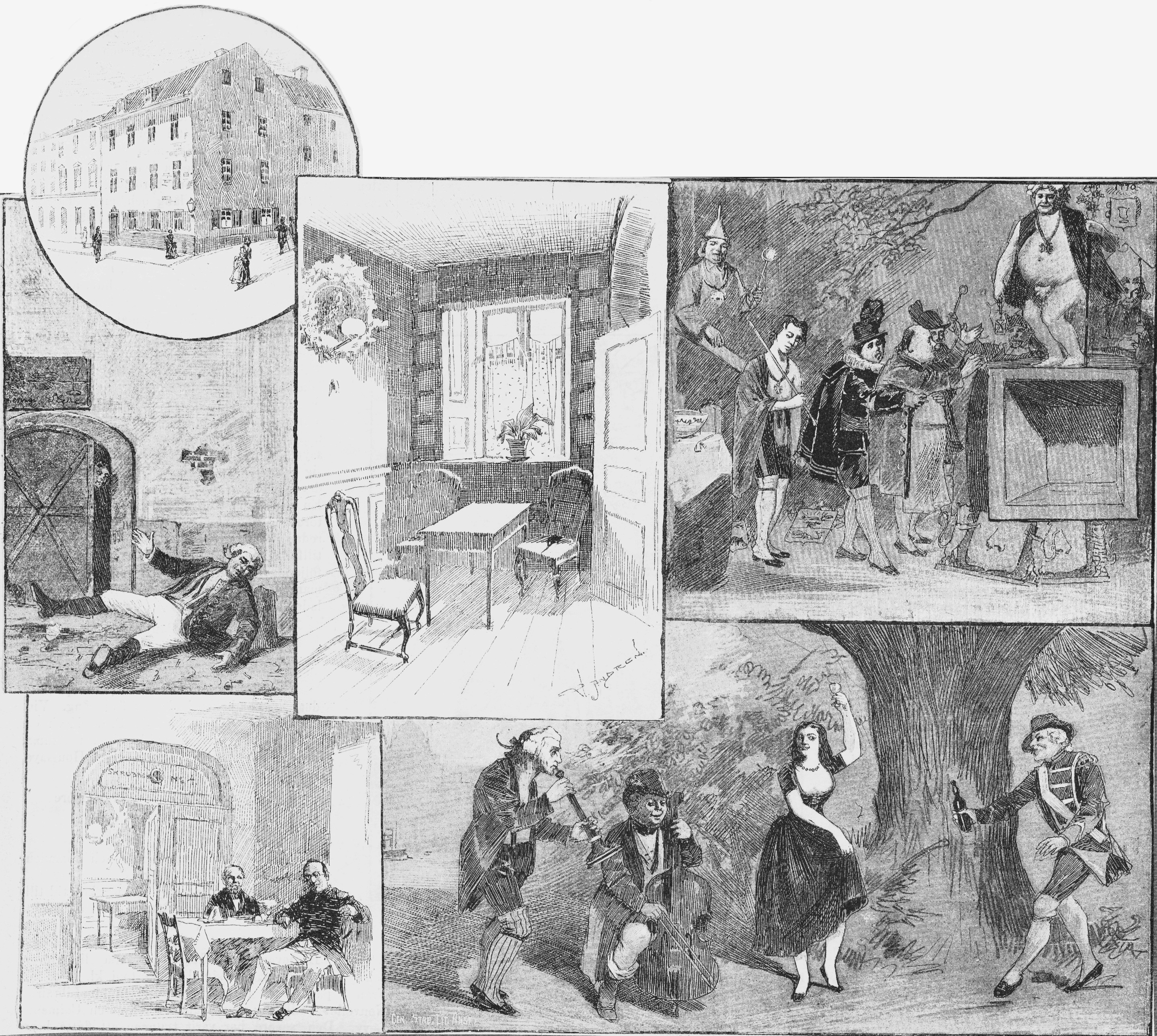 Tre Remmare, Regeringsgatan 47 (väggmålningar av Oskar Savlander i Skubben nr 4)